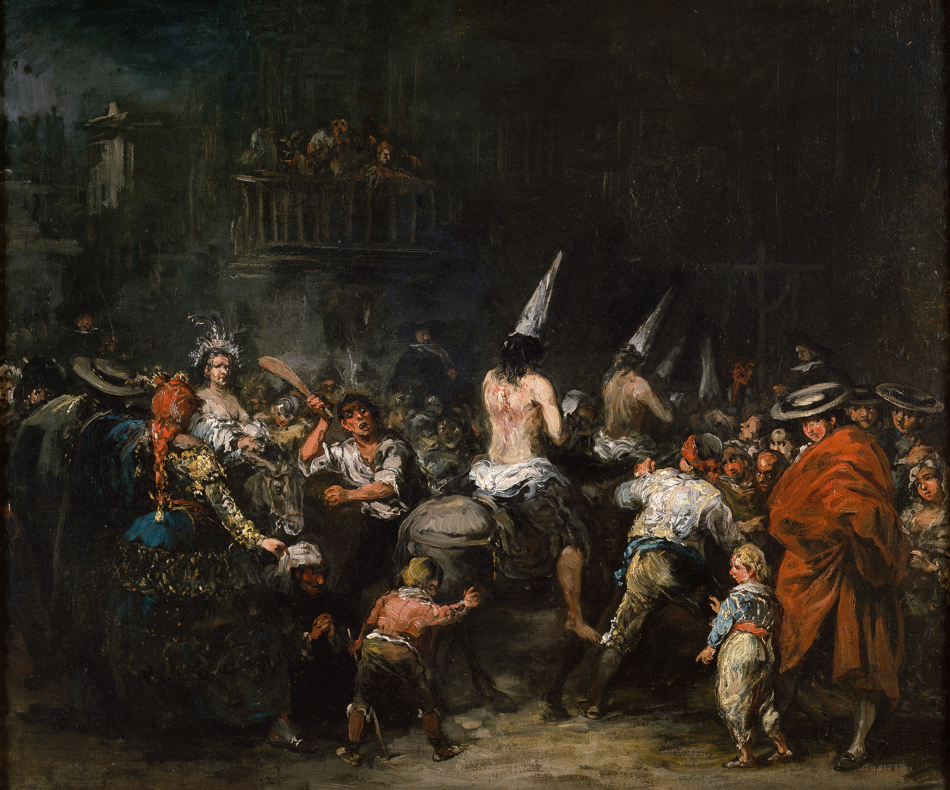 Eugenio Lucas Velázquez, Condenados por la Inquisición, ca. 1833-1866, óleo sobre lienzo, 77,5 cm x 91,5 cm. Museo del Prado